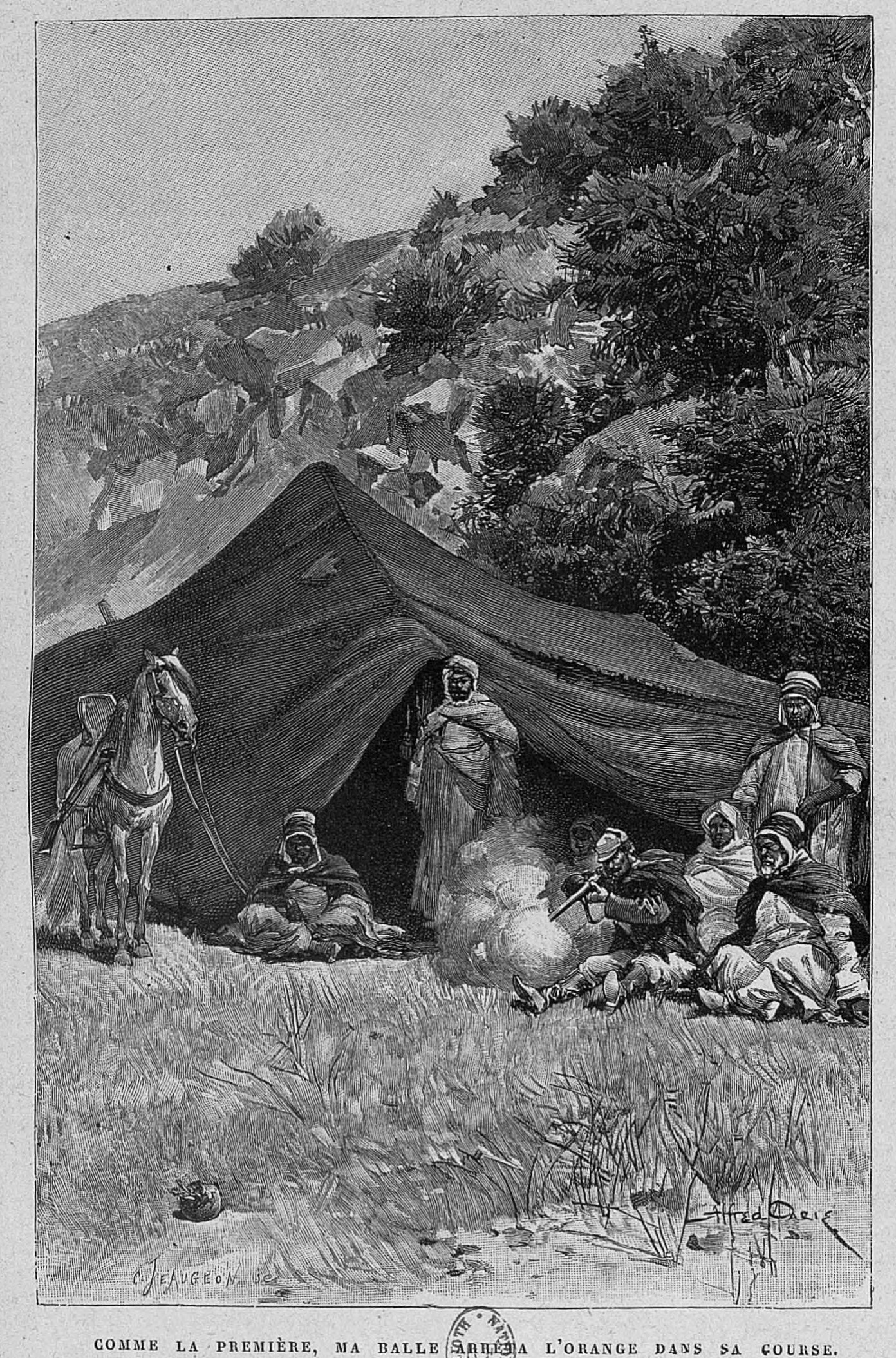 Page du livre sur Charles Bombonnel